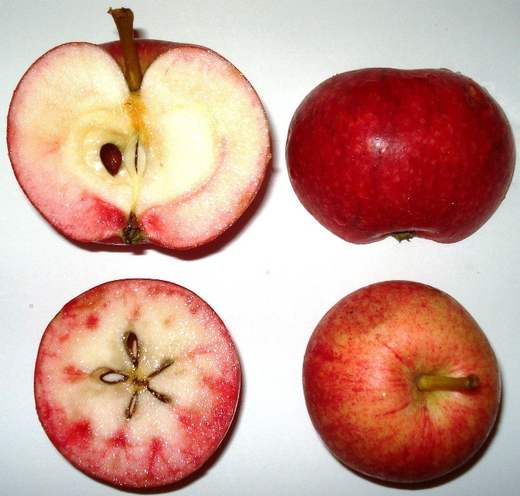 Malus - Schoener aus Bath